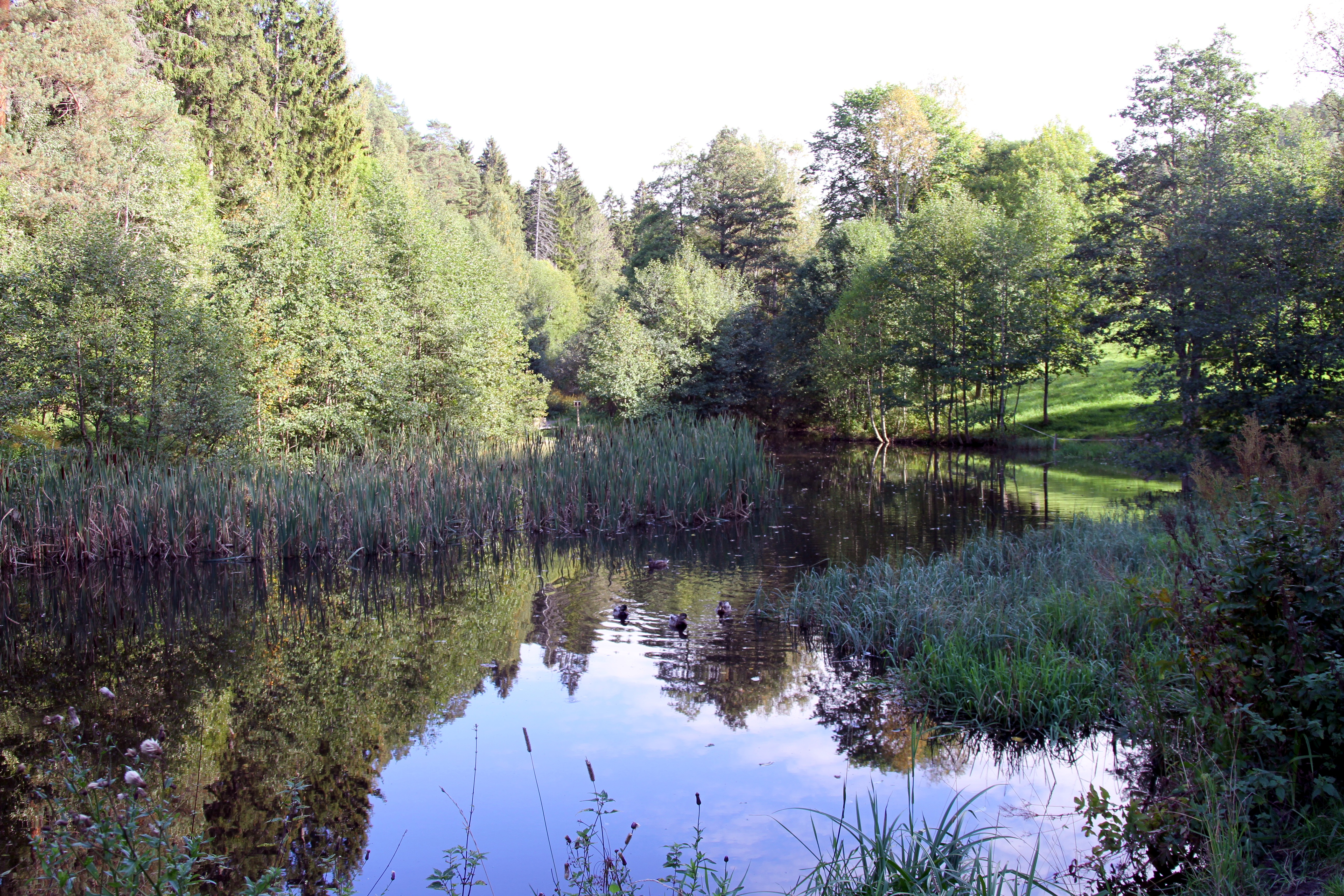 Sagdammen i Skulleruddumpa i Oslo.